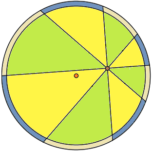 中文（中国大陆）: 披萨边定理图示，薄边披萨